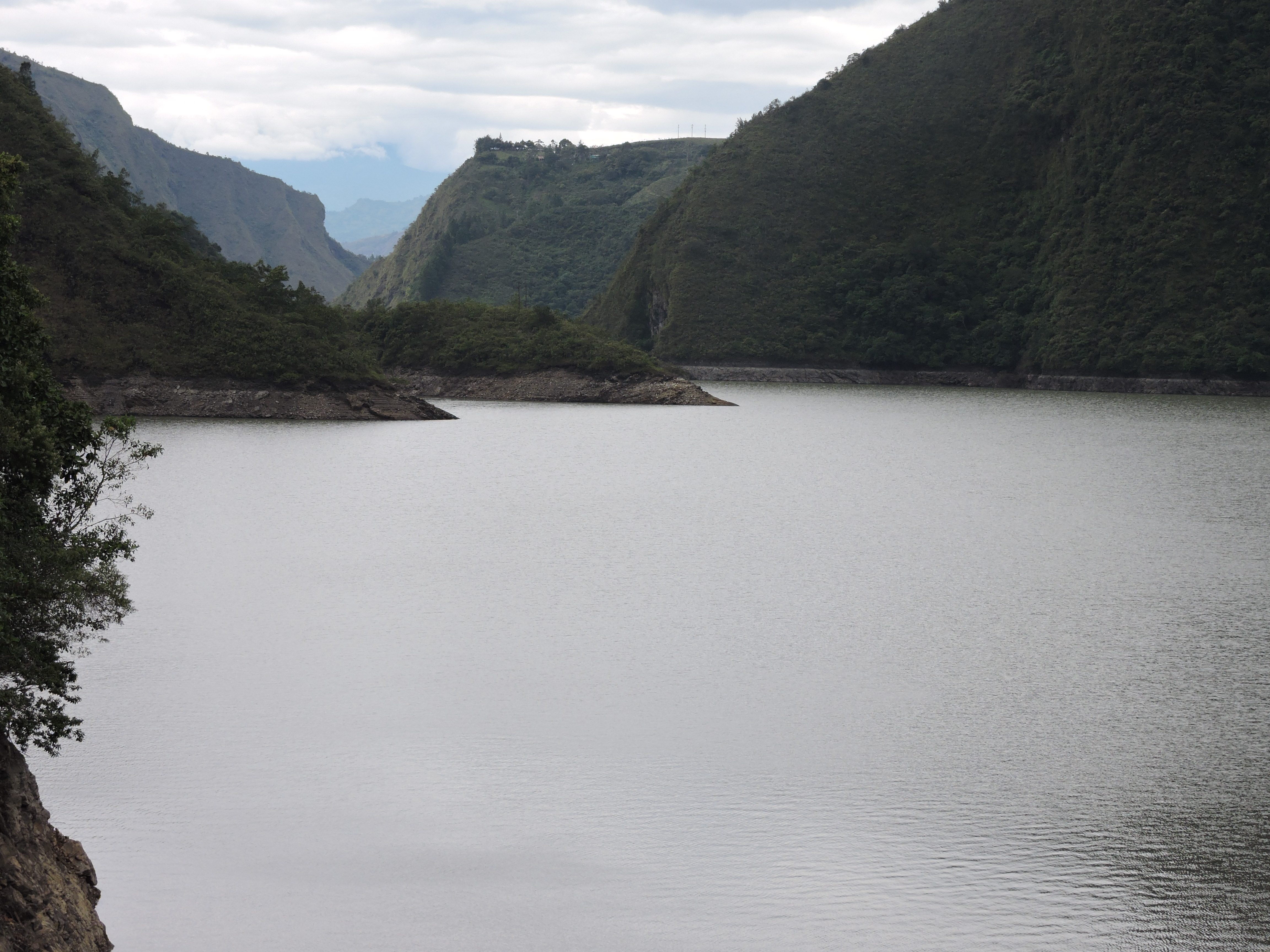 Presa de Chivor Esta fotografía fue tomada en el municipio colombiano con código 15690.